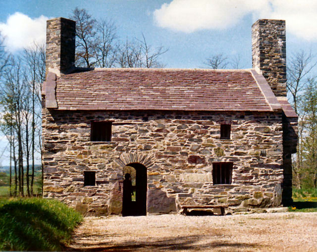 Welsh Folk Museum / Amgueddfa Werin Cymru, St Fagans, Cardiff, Wales